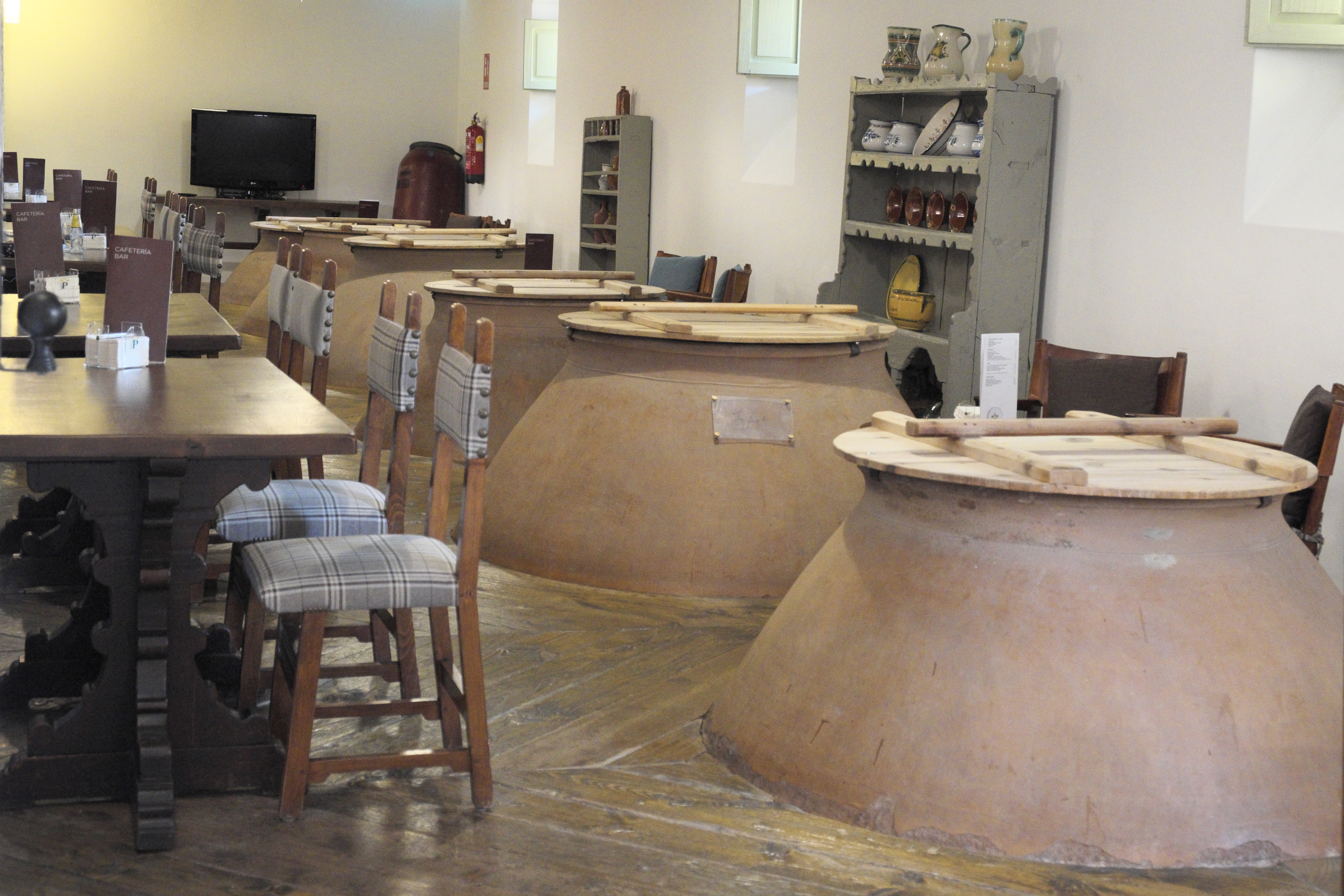 Parador in Almagro in der Provinz Ciudad Real (Kastilien-La Mancha/Spanien), ehemaliger Vorratsraum